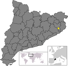 Location of Cassa de la Selva, in Catalonia.